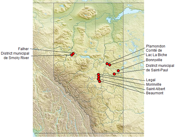 Réseau des municipalités bilingues de l’Alberta (: Beaumont, Legal, Falher, Plamondon, Morinville, Saint-Albert, Bonnyville, le comté de Lac La Biche, le district municipal de Smoky River et Saint-Paul.)